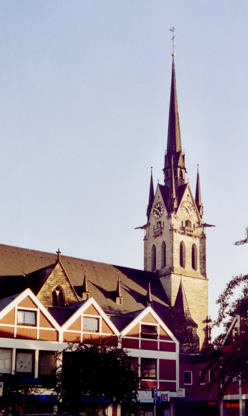 Die St.-Jakobi-Kirche in Peine mit dem Echternplatz im Vordergrund.